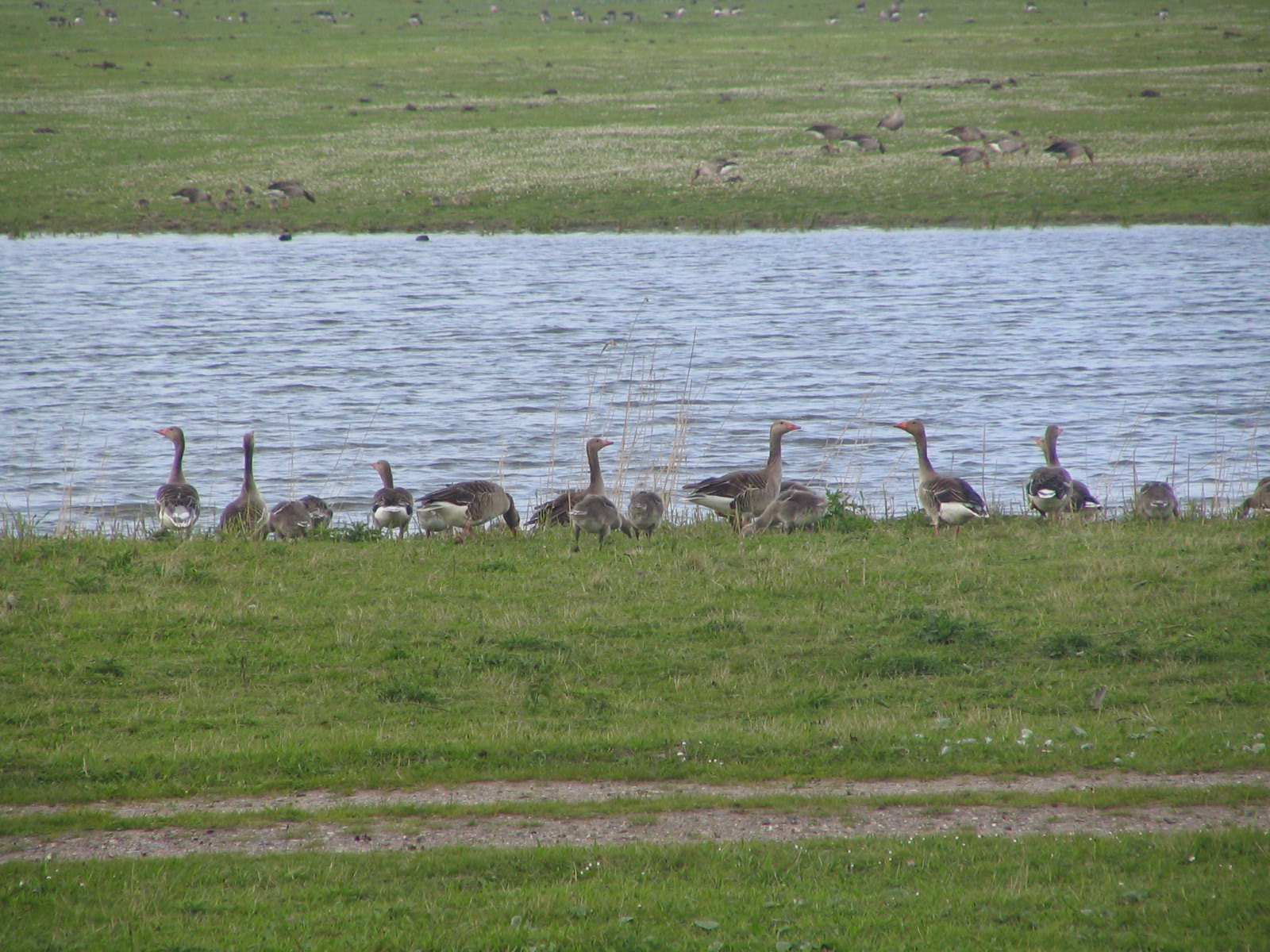 Oostvaardersplassen